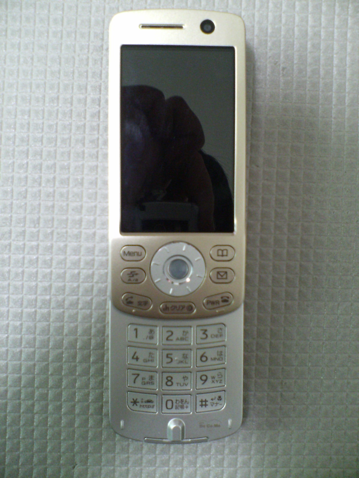 NTT DoCoMo FOMA D903i(Open)